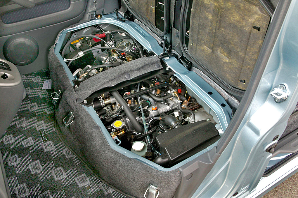 Daihatsu Atrai EF-DET Inline 3 DOHC turbo engine